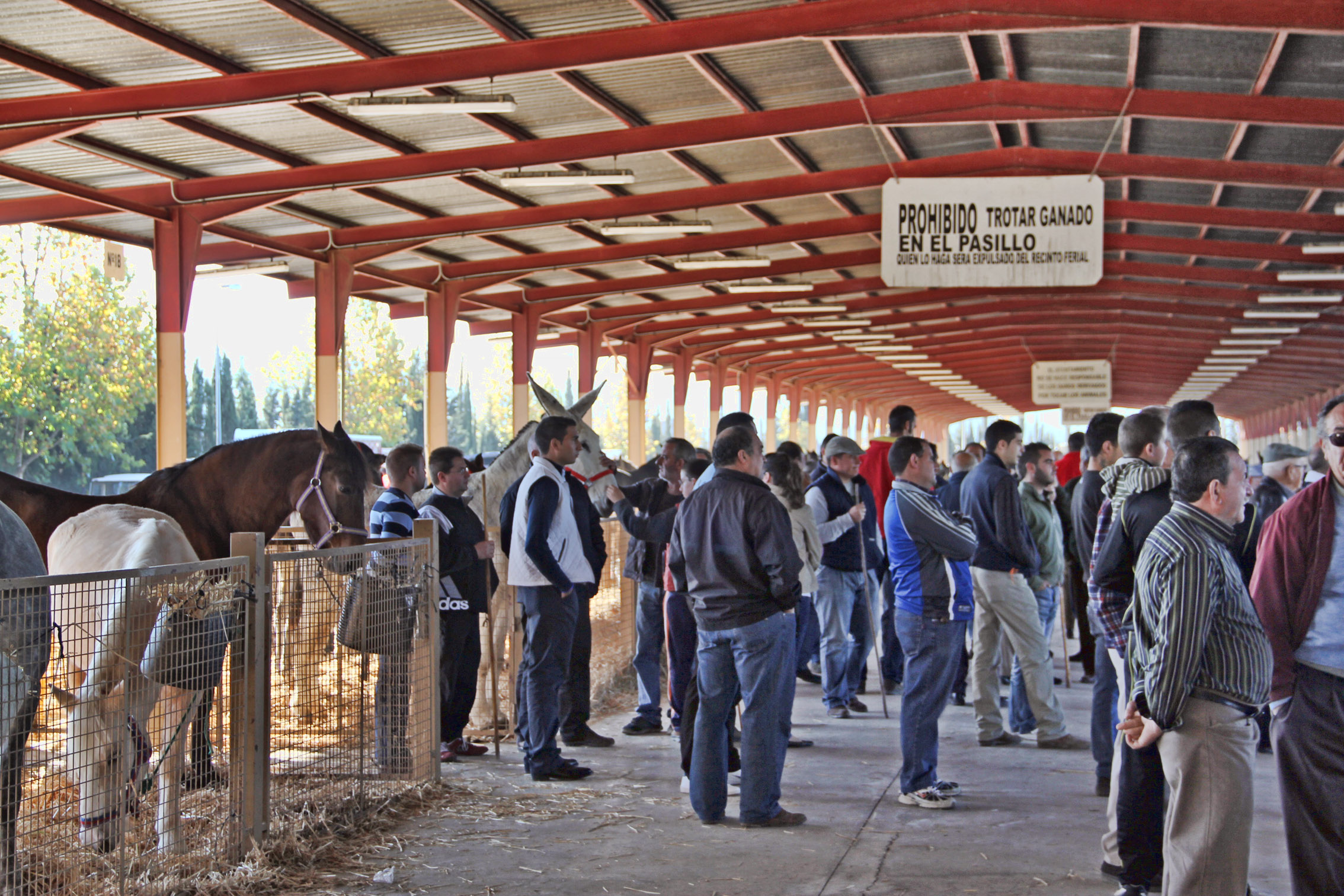 Momento de la feria de ganado celebrada en el año 2011